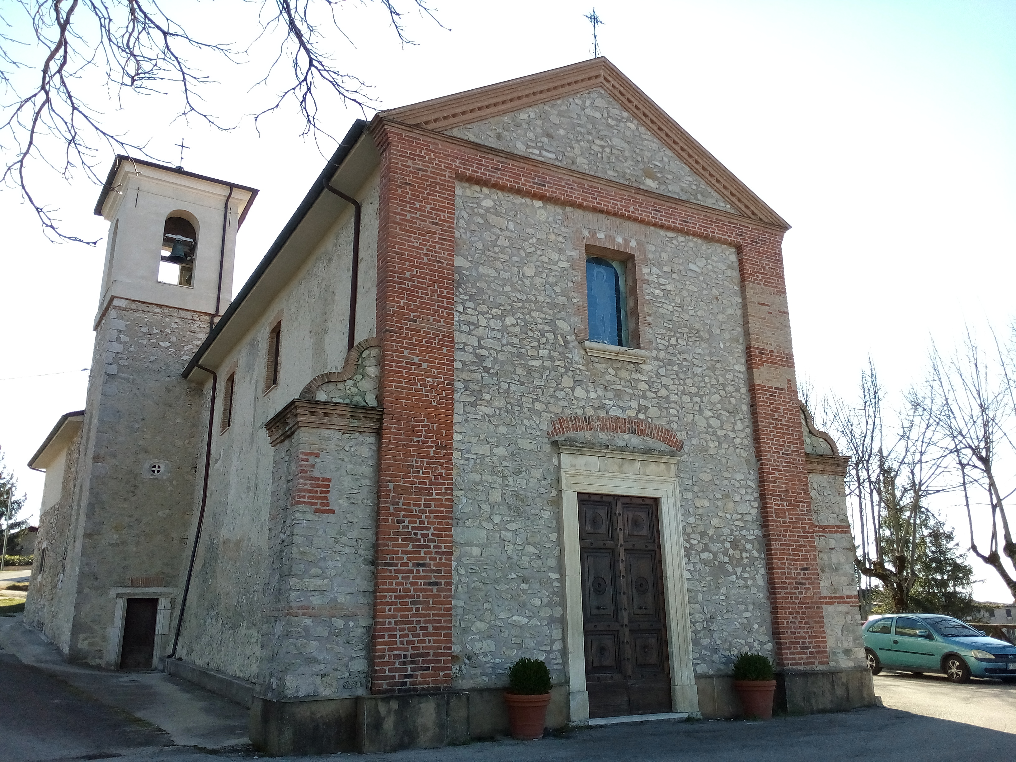 Facciata della chiesa di San Sebastiano martire a Nespolo